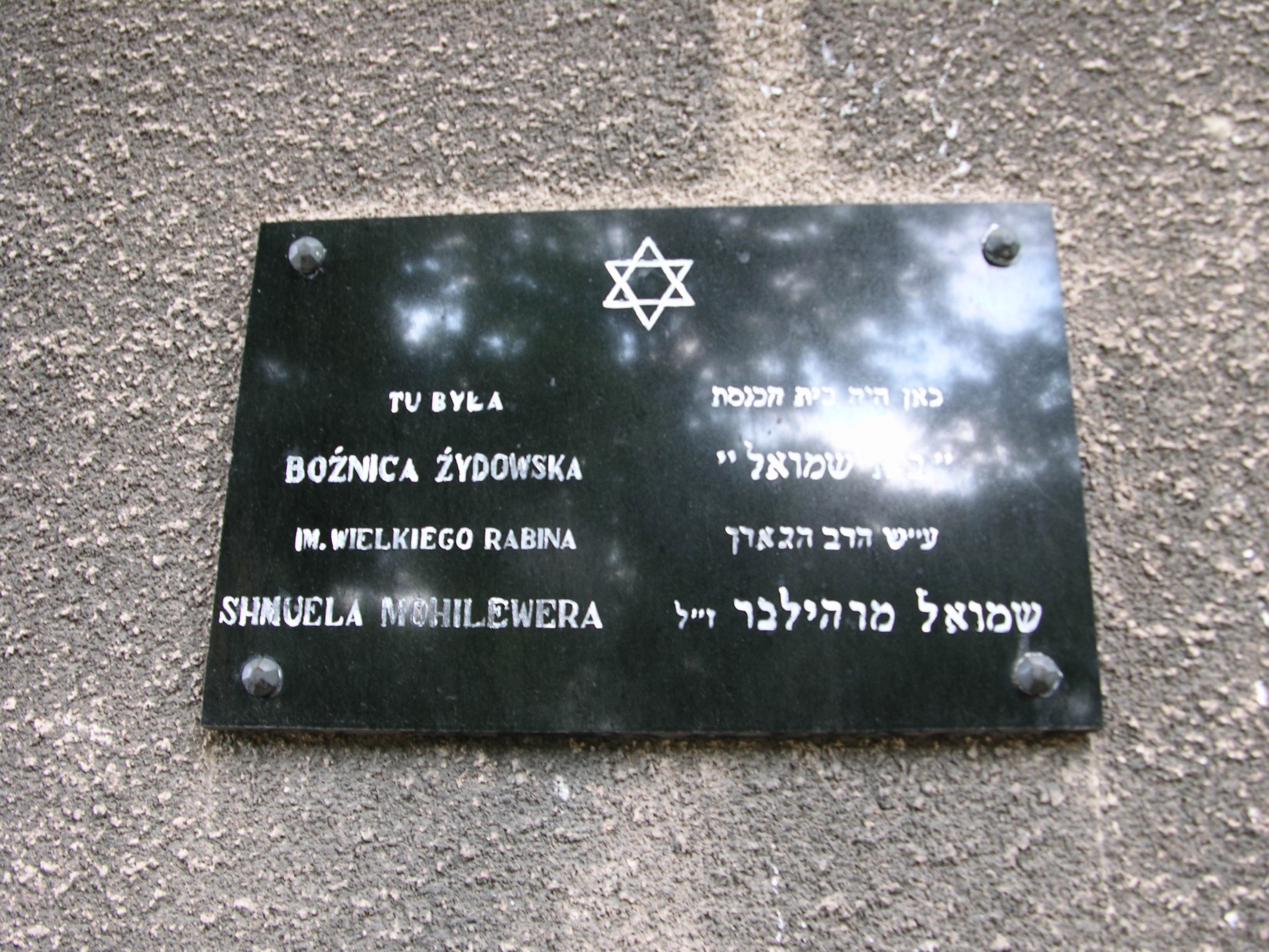 Beit Szmuel Synagogue in Białystok